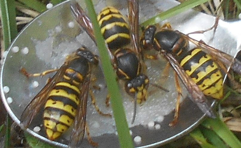 Naše největší dlouholebá vosa. Na snímku několik dělnic konzumuje med